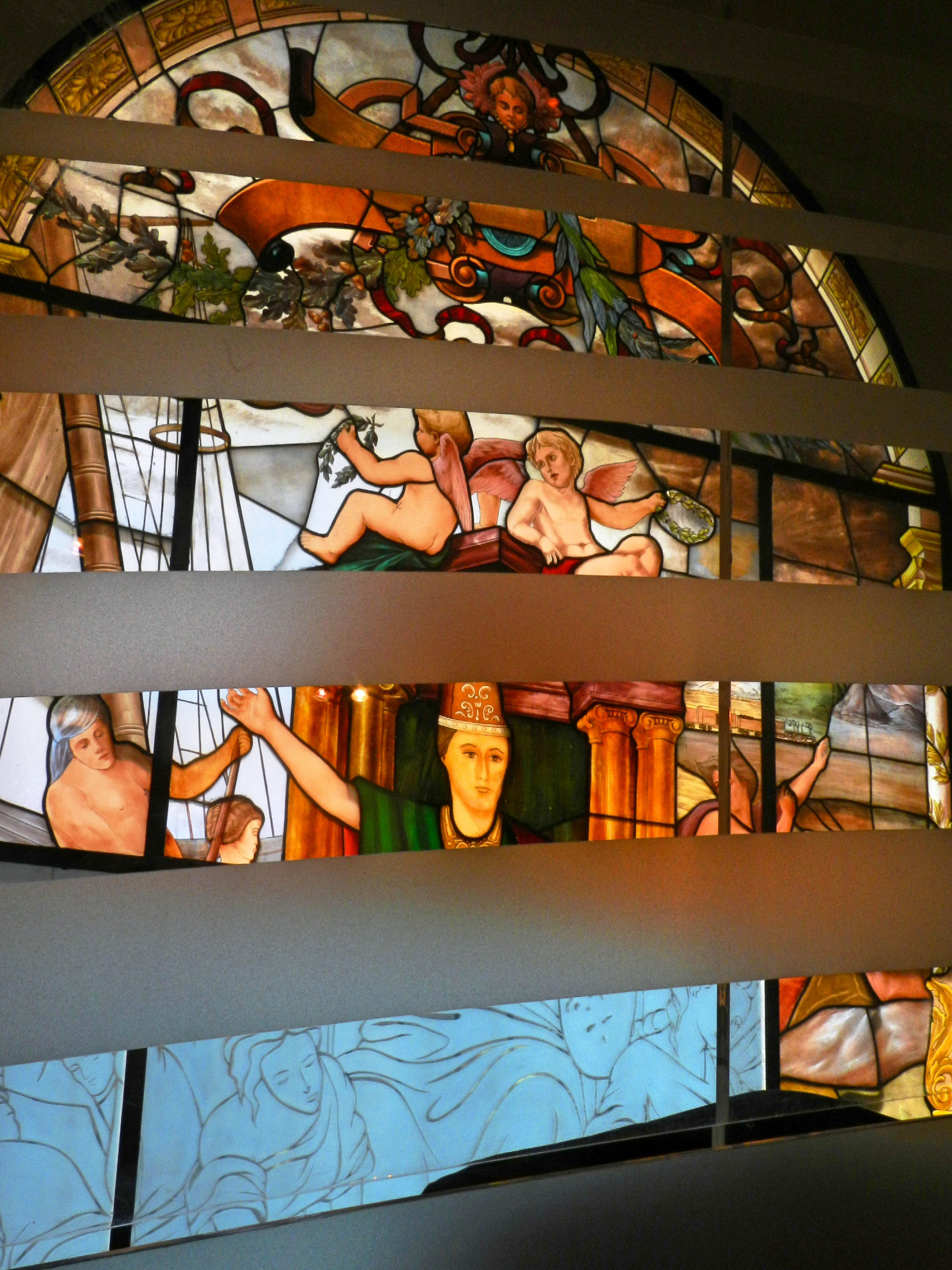 Vitral en el Museo de la Luz